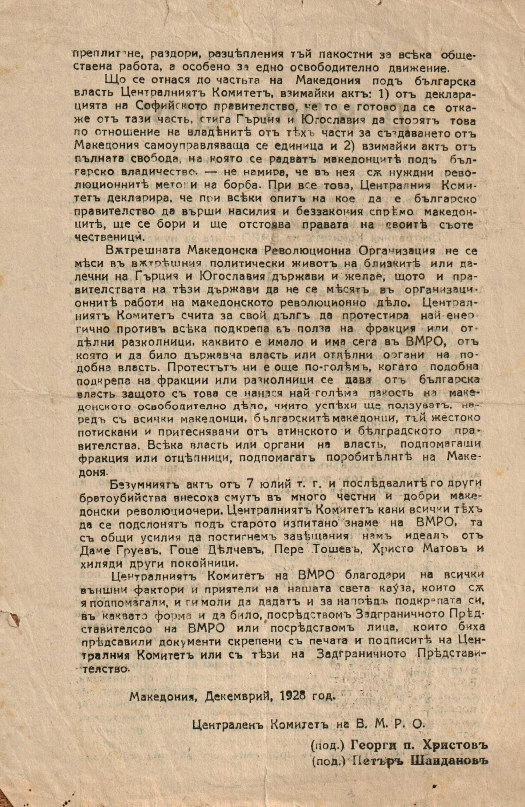 Доклади, изложения, декларации, писма и др. на ВМРО за организационното състояние, характера и дейността на организацията